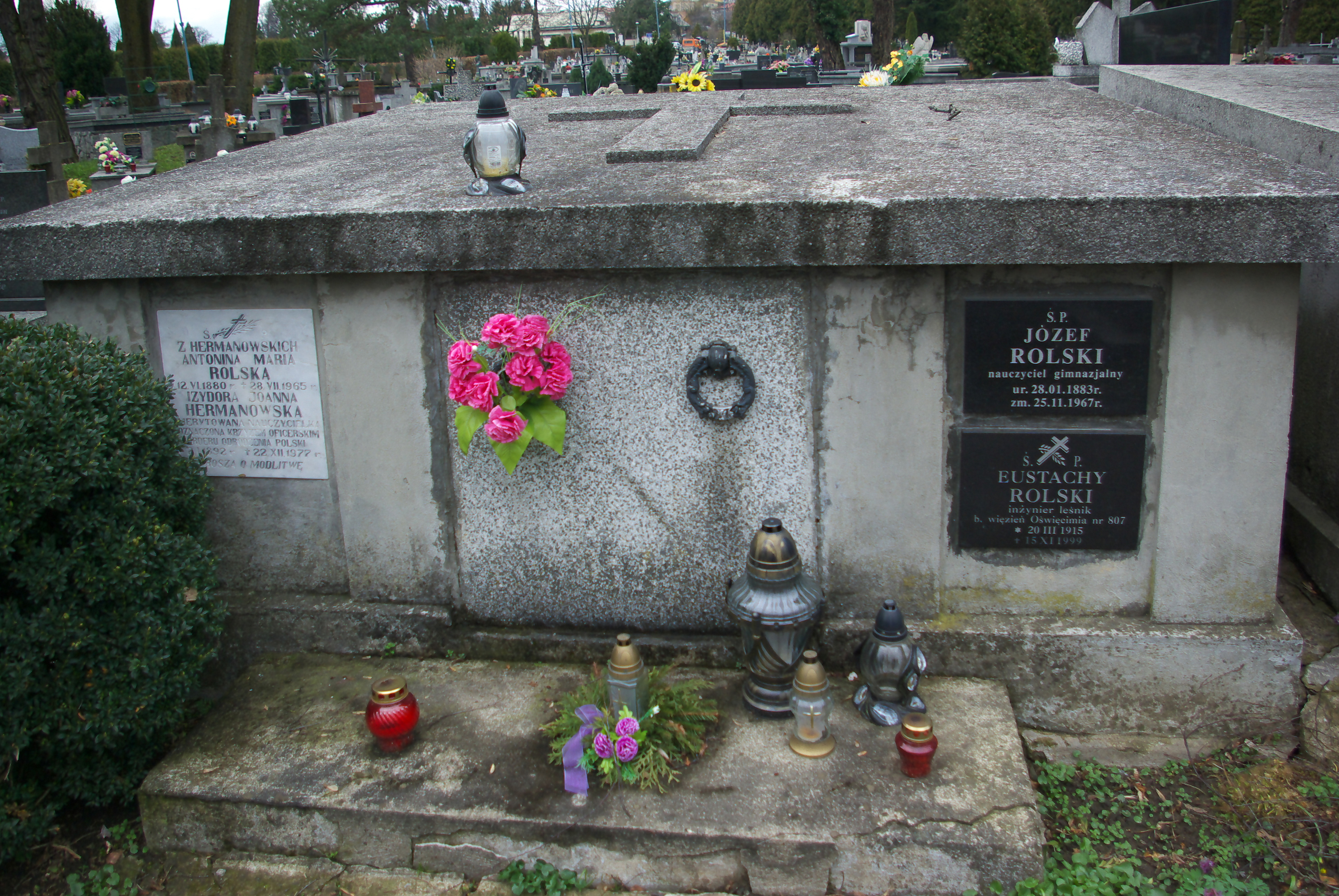 Grobowiec rodziny Rolskich w części „Matejki Stary” Cmentarza Centralnego w Sanoku